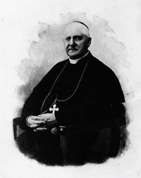 Kardynał, arcybiskup metropolita poznańsko-gnieźnieński, Prymas Polski Mieczysław Halka-Ledóchowski